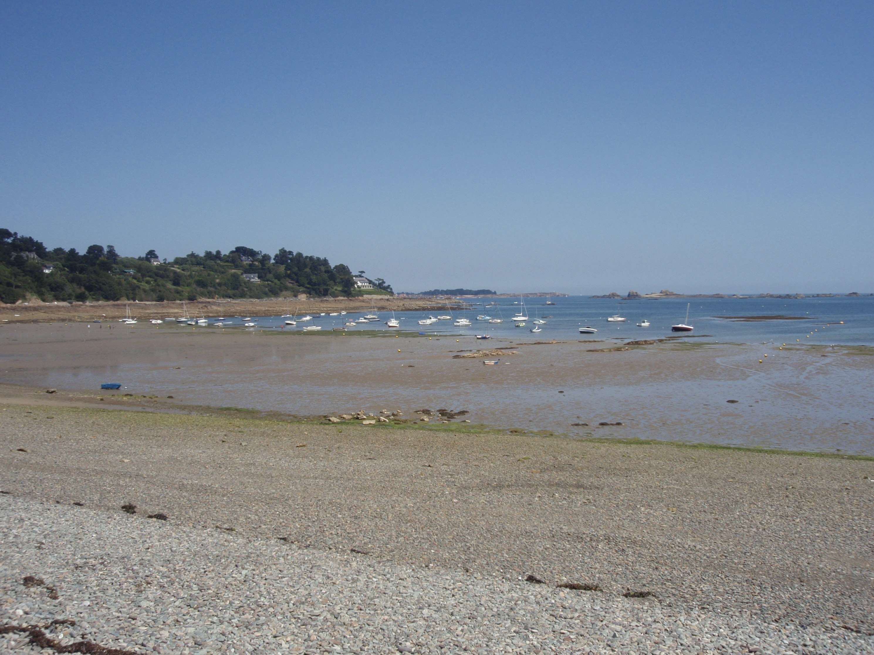 Baie de Launay à Ploubazlanec (Côtes-d'Armor, France). En arrière-plan la pointe de l'Arcouest côté sud-est. Ma maison Bettencourt est au bout de la pointe, la maison de Marie Curie sur la gauche ("Sorbonne-Plage", voir Ploubazlanec). Île de Bréhat à l'horizon, avec le phare du Paon à son extrémité droite (à peu près au milieu de la photo). Les rochers à droite sont l'île Blanche.